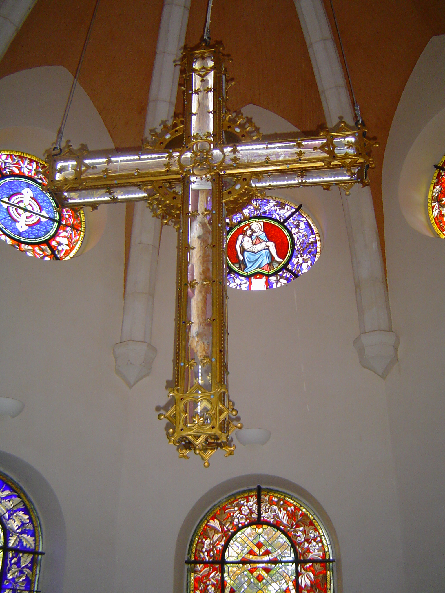 Notre-Dame du Laus - Chapelle du Précieux Sang (4)